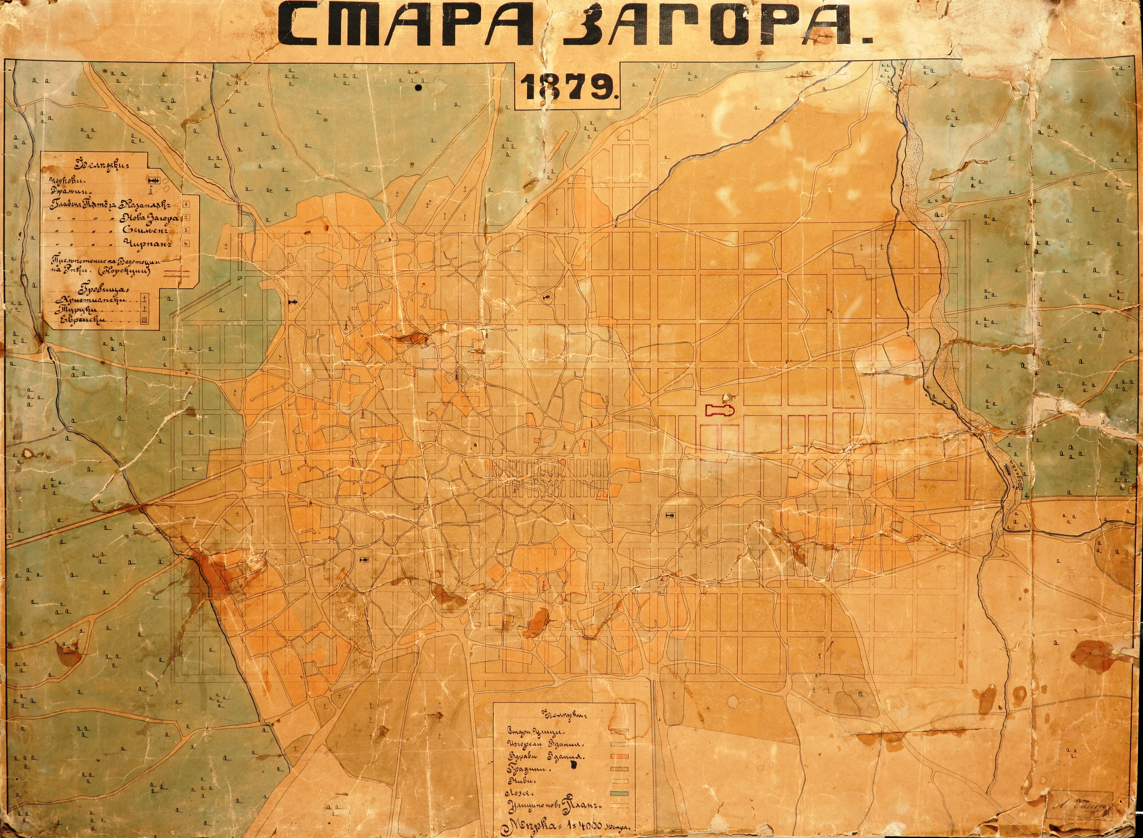 План за възстановявне на Стара Загора от австрийския архитект Любор Байер